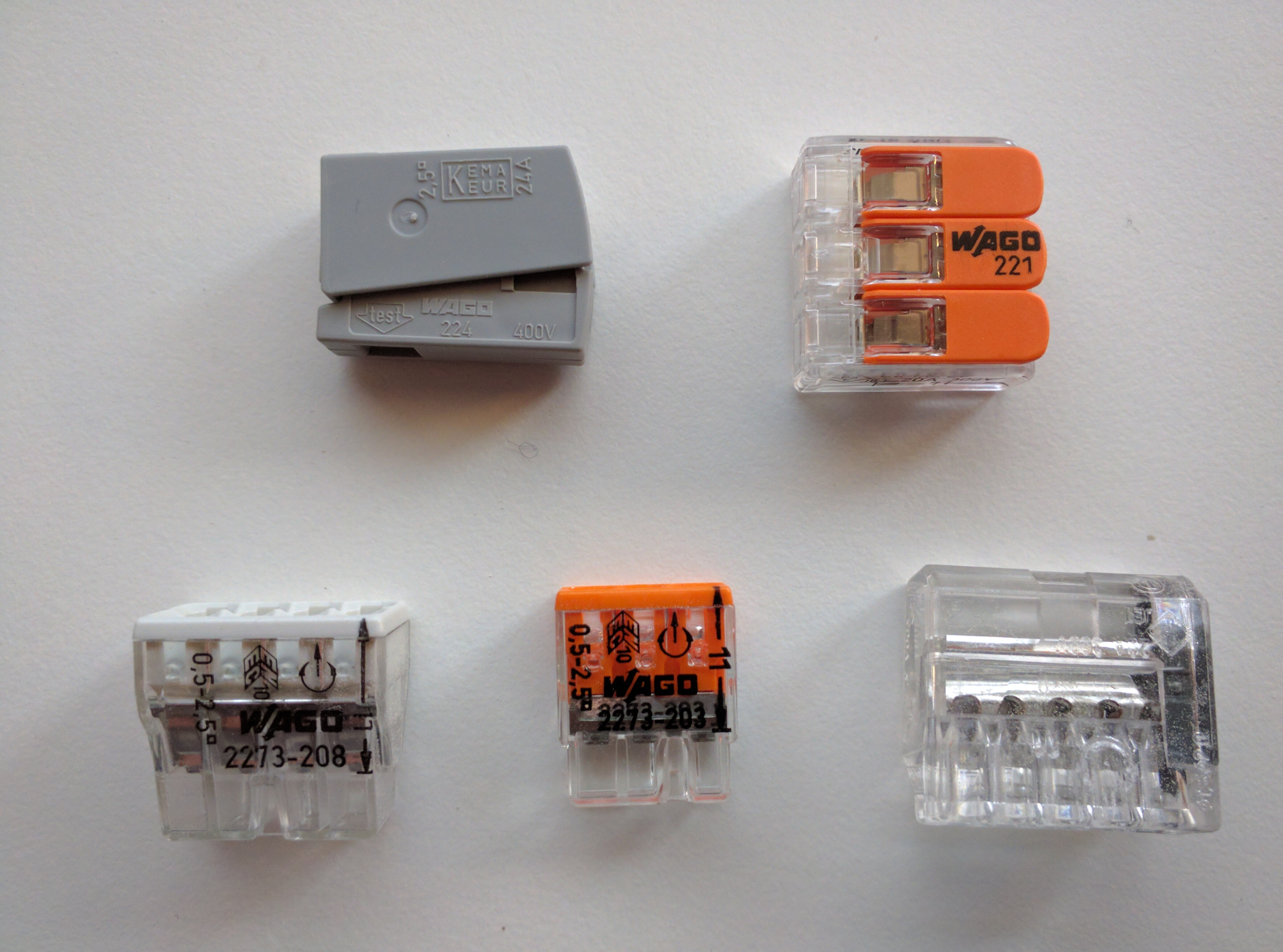 Wago-Installationsklemmen, v.o.n.u. u. v.l.n.r. Leuchtenklemme zur Verbindung eines starren und eines flexiblen Leiters, Klemme für drei beliebige Leiter, Klemme für acht starre Leiter, Klemme für drei starre Leiter, Klemme für fünf starre Leiter (ältere Bauart)